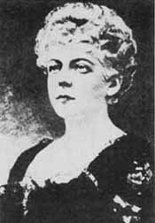 Mrs Ayer